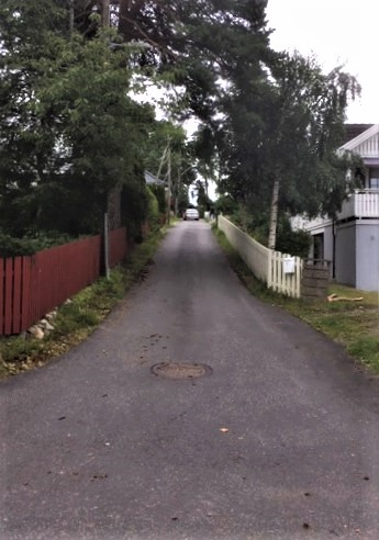 Via Nova i Oslo august 2019